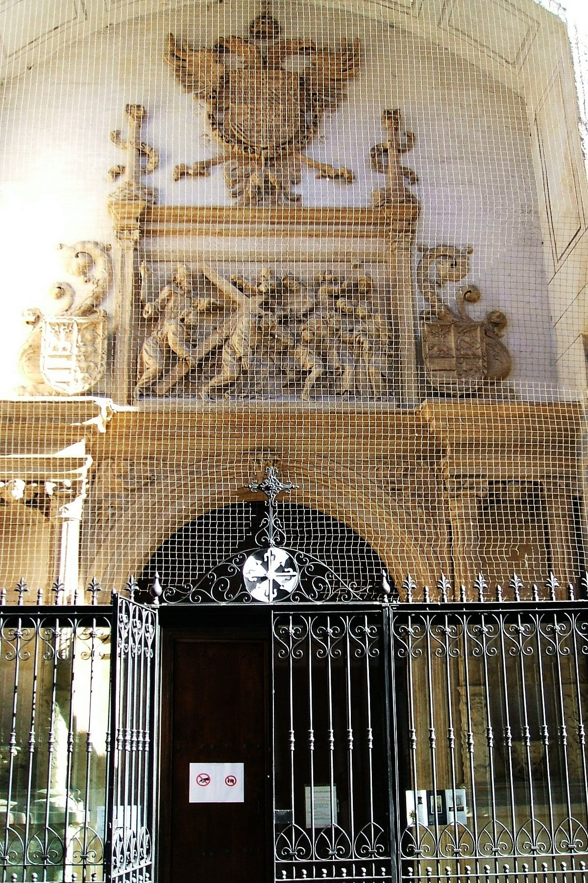 Convento de Santa Cruz (MM Dominicas), Vitoria-Gasteiz